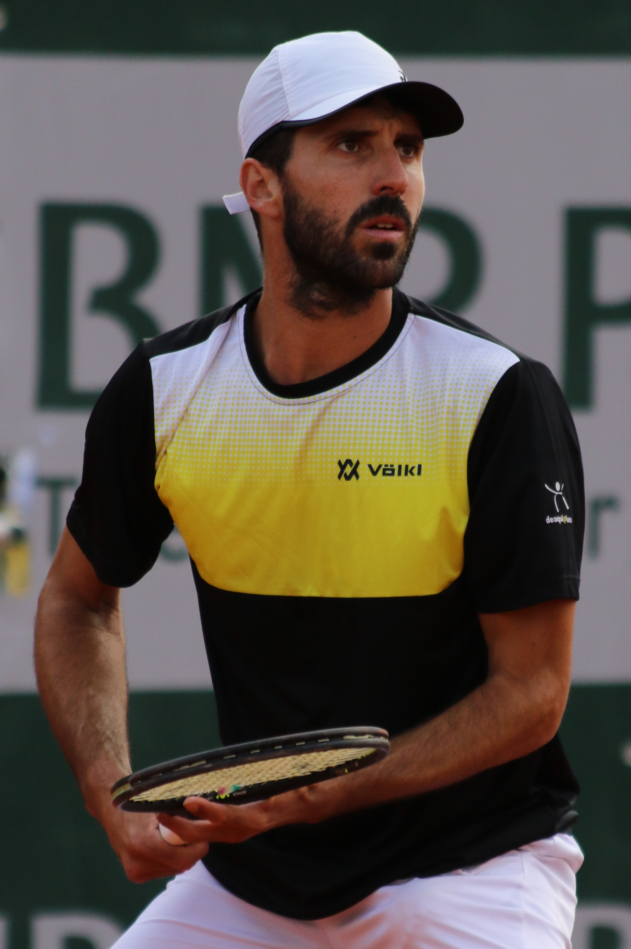 Gutierrez Ferrol RGQ19 (31)